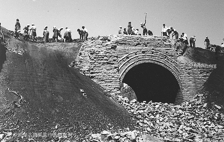 中文（中国大陆）: 沈阳小南门